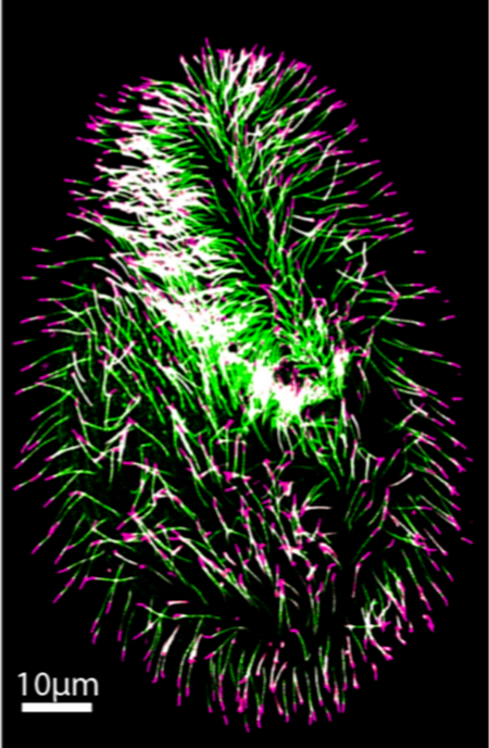 Fig. 2. Patrón ciliar de paramecia agotada para proteínas TZ. (A) Patrón ciliar de paramecia tratada con control RNAi o TZ RNAi(CEP290, RPGRIP1L y NPHP4). Las células se inmunotinaron mediante la tubulina monoclonal anti-monoglicilada TAP952 (magenta, etiquetado de la punta de los cilios) y los anticuerpos policlonales contra la tubulina anti-poli-glutamilada (poliE) (verde, decorando BB y cilios).